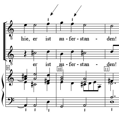 H. Schütz (1585-1672) - "Die Auferstehung"